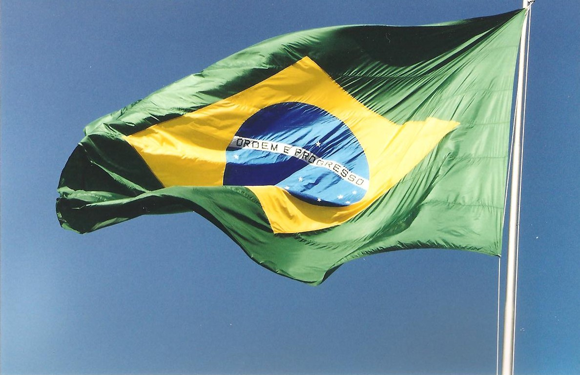 Bandeira brasileira. Medo de autoridade. Parada 9 de julho de 2003. Fotógrafo: Edu Parez